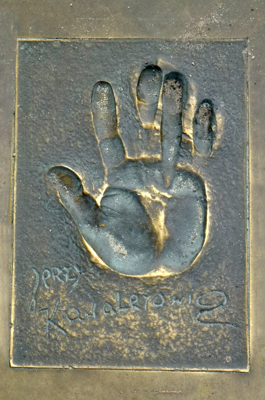 Odcisk gwiazdy na ul. Aleji Gwiazd w Międzyzdrojach woj. zachodniopomorskie pow. kamieński